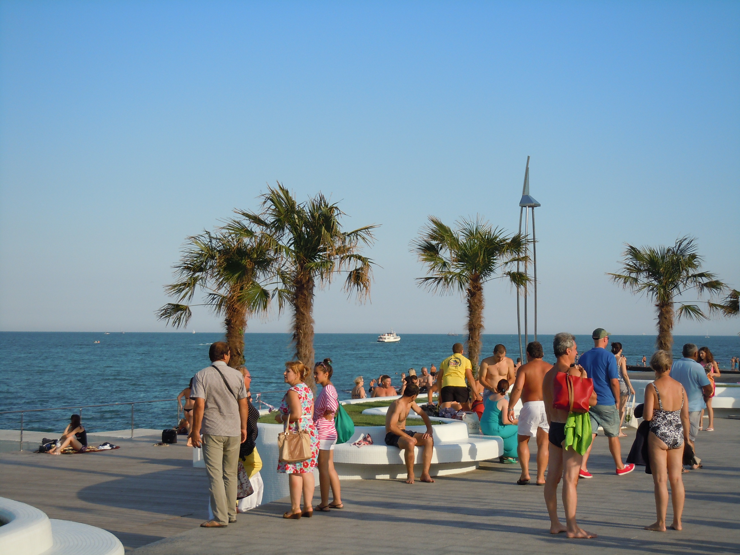 Вид на море з мису Ланжерон, Одеса